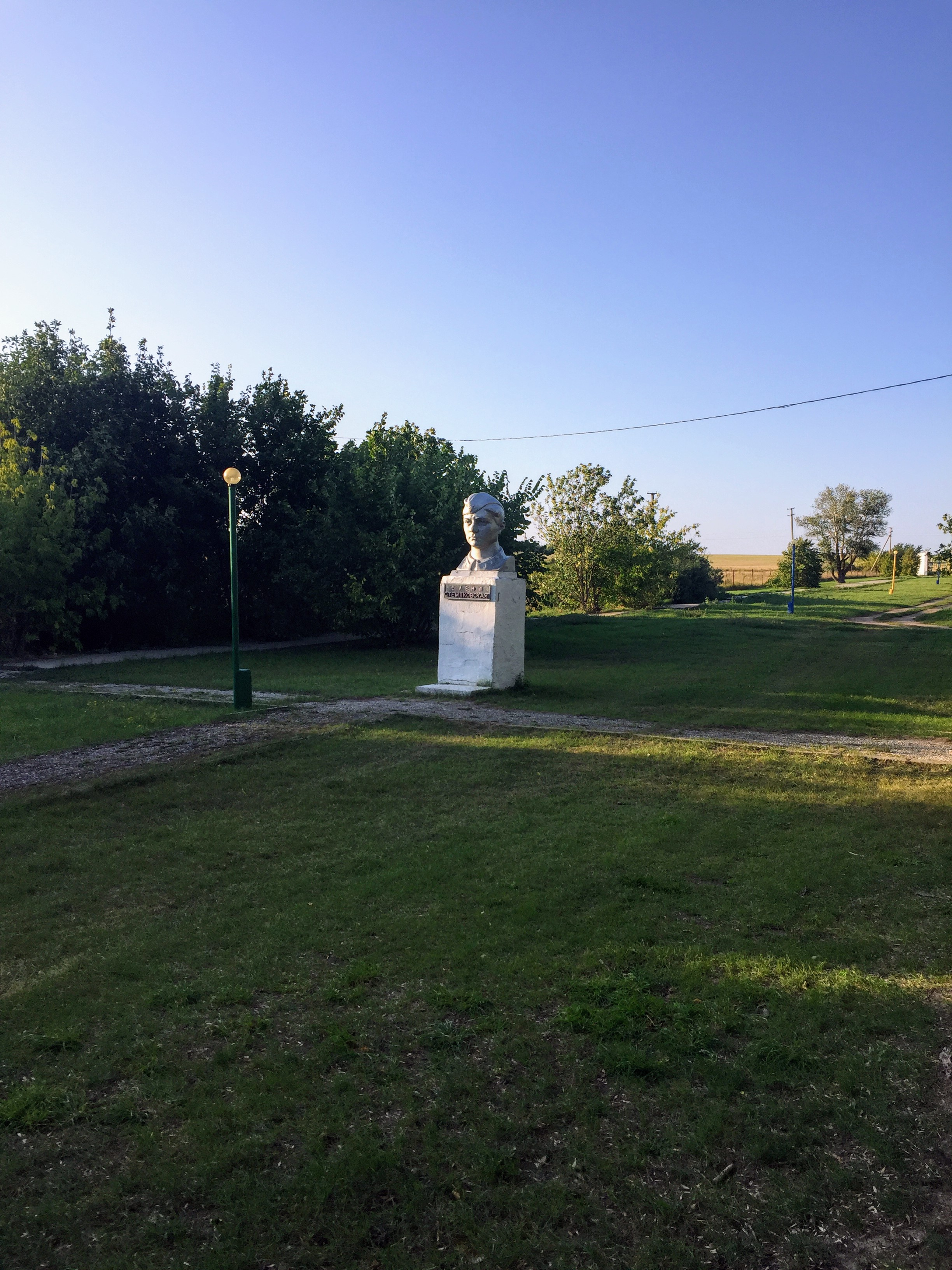 Бюст Елены Стемпковской в на центральной аллее детского лагеря «Серебряные пруды» в Волгоградской области.